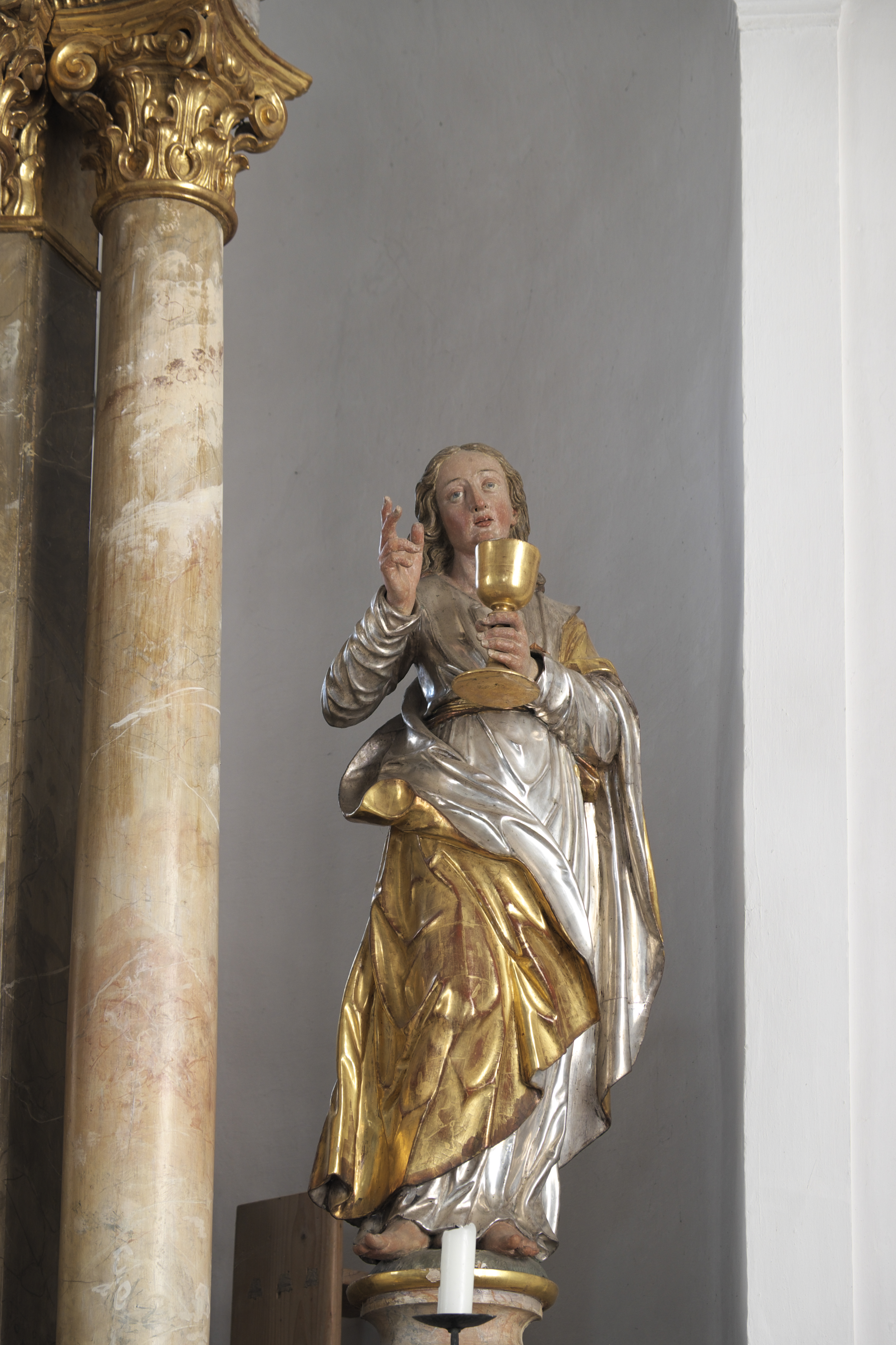 Katholische Pfarrkirche St. Johannes Baptist in Zankenhausen (Türkenfeld) im Landkreis Fürstenfeldbruck (Bayern/Deutschland), Apostelfigur aus der Werkstatt von Lorenz Luidl, von 1710/20; Apostel Johannes